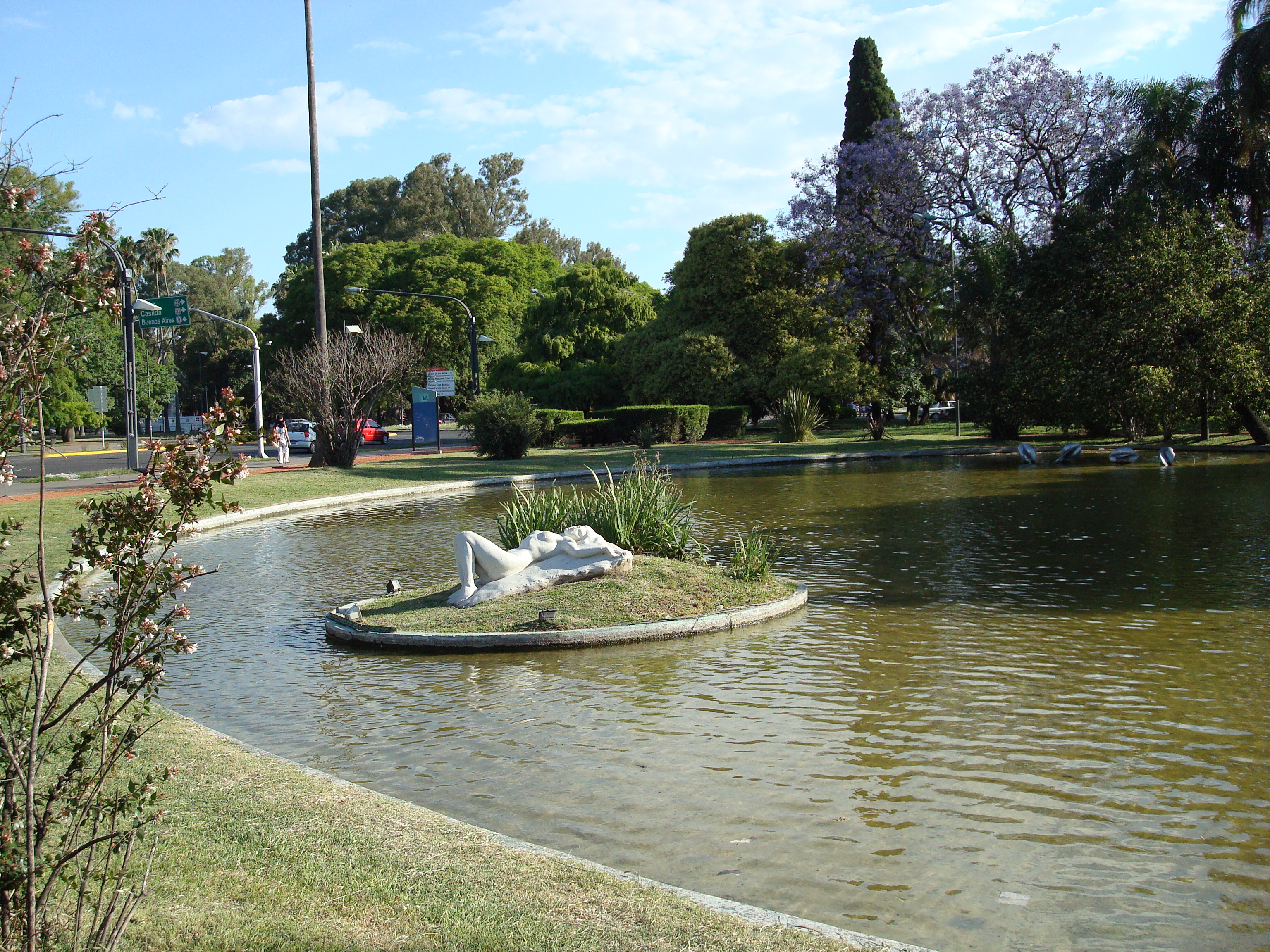 Lago pequeño en la entrada al Parque de la Independencia, Rosario, Argentina